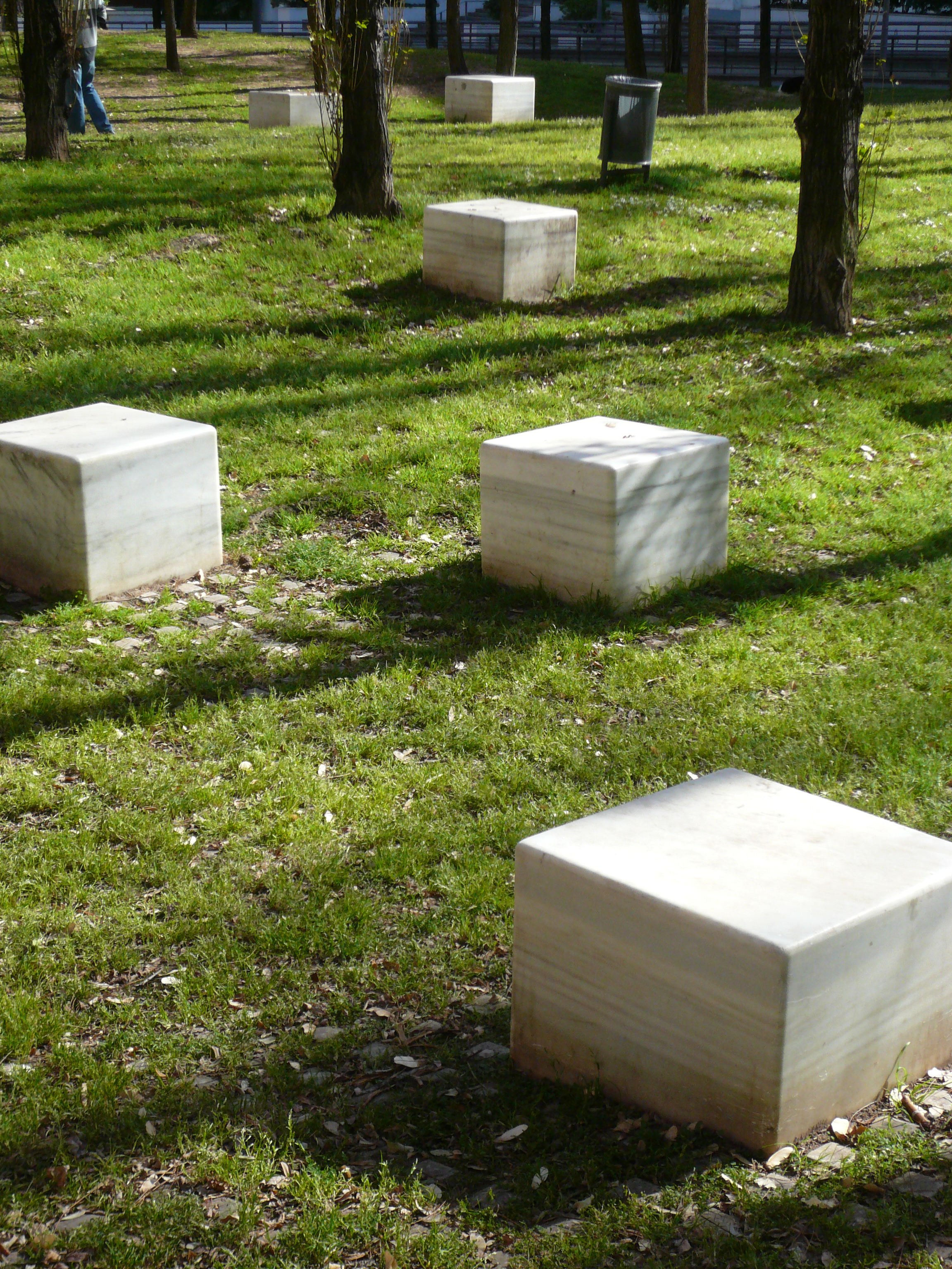 Jardins d'Olga Sacharoff. Jardins d'Olga Sacharoff (Barcelona). Paisatge: Marta Gabàs, Carles Casamor. Material: marbre blanc sobre paisatge. 1994. 46″ N, 2° 08′ 00.6″ E